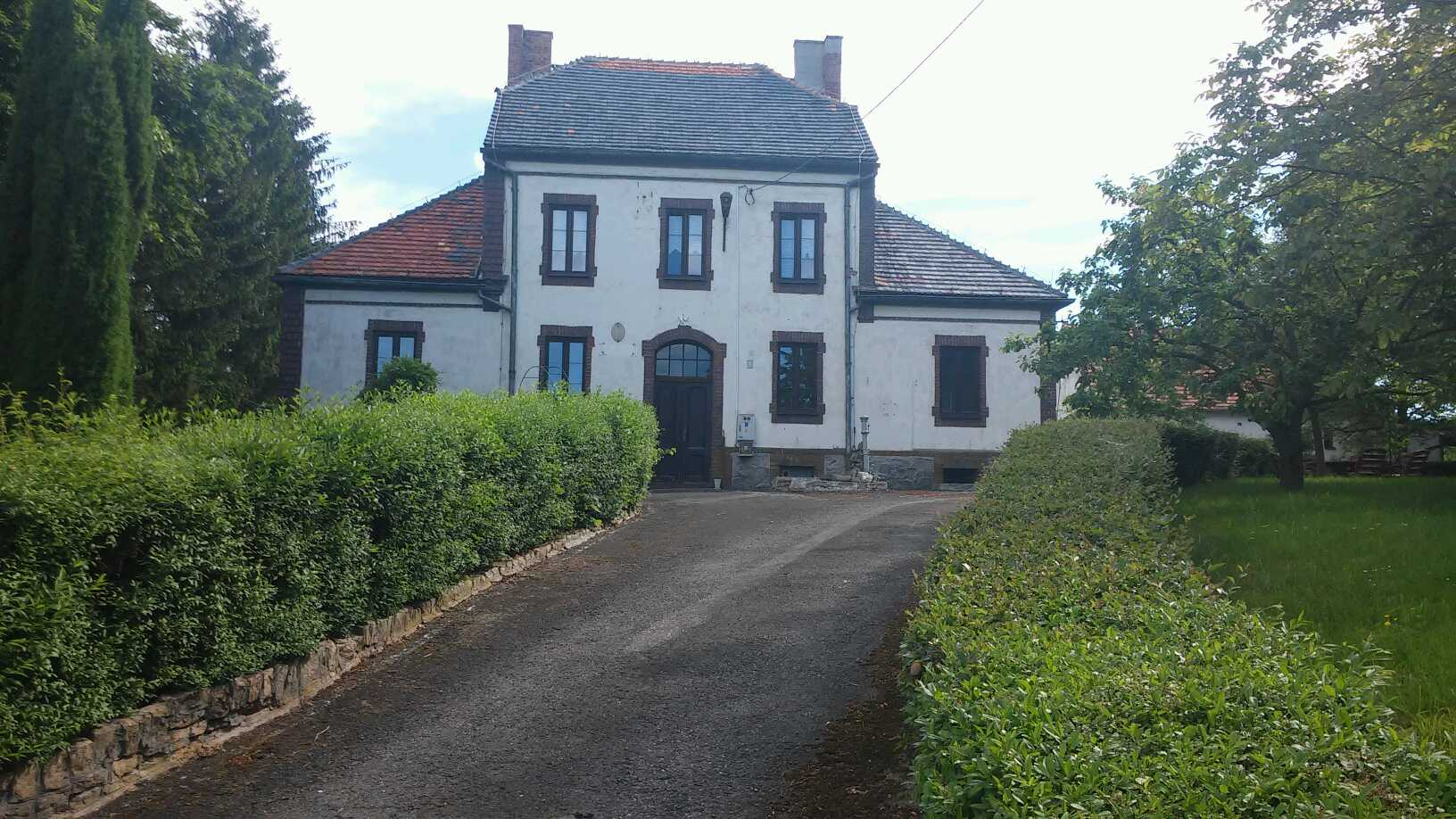 Krasne Pole, budynek po byłej Strażnicy Wojsk Ochrony Pogranicza Krasne Pole (WOP), a od 16 maja 1991 roku Strażnica Straży Granicznej w Krasnym Polu (SG). Obecnie własność prywatna